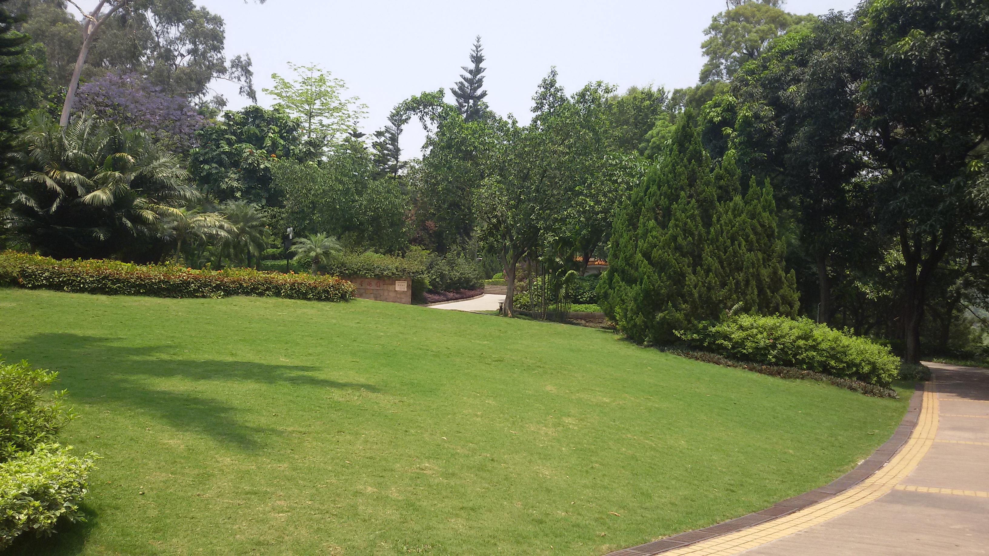 粵語: 麓湖公园嘅星海園景區